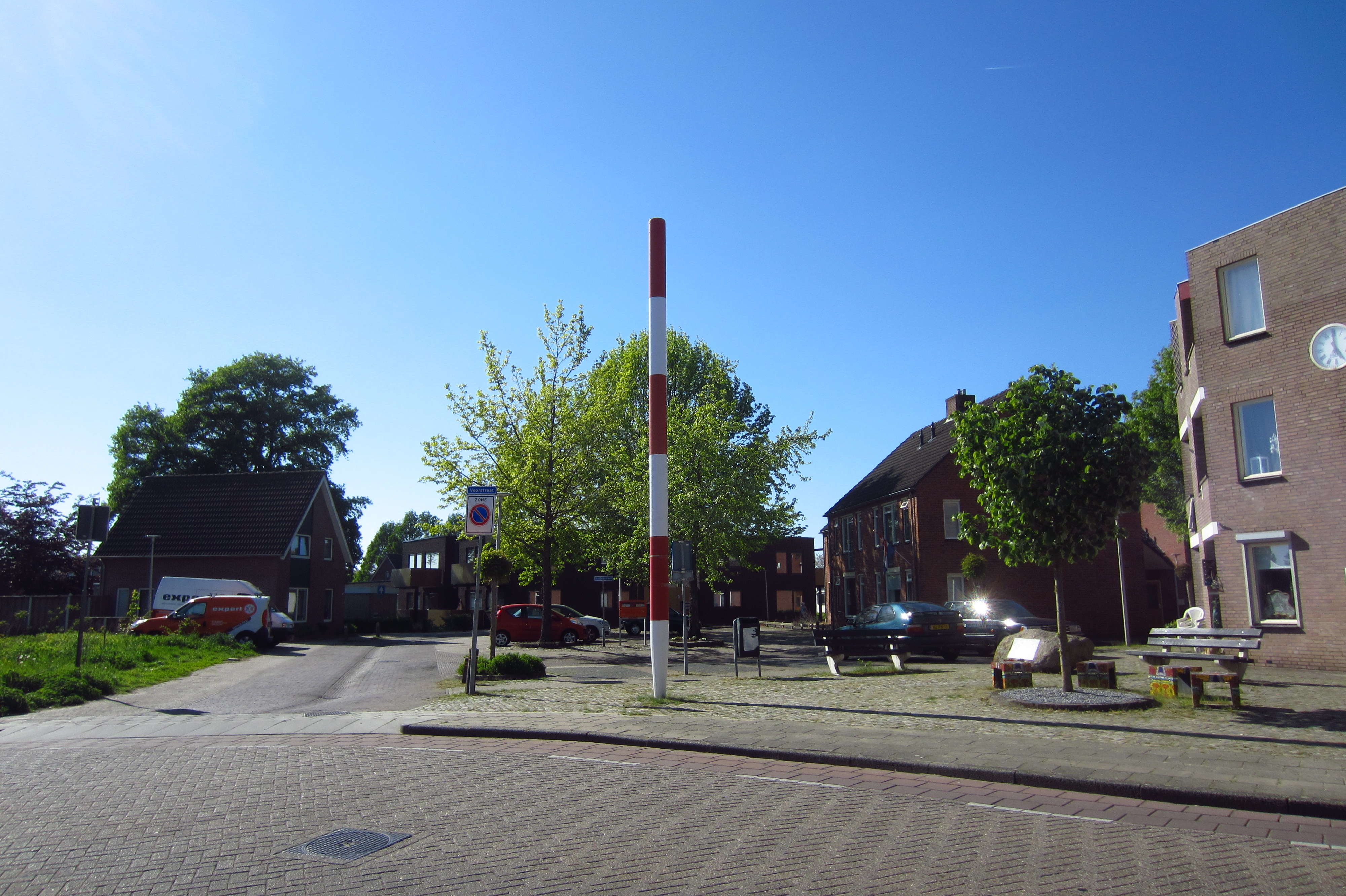 Kunstwerk van Sepp Bader op 't Schild in Goor (Hof van Twente), getiteld 10.000 jaar geleden, geplaatst in 1989.